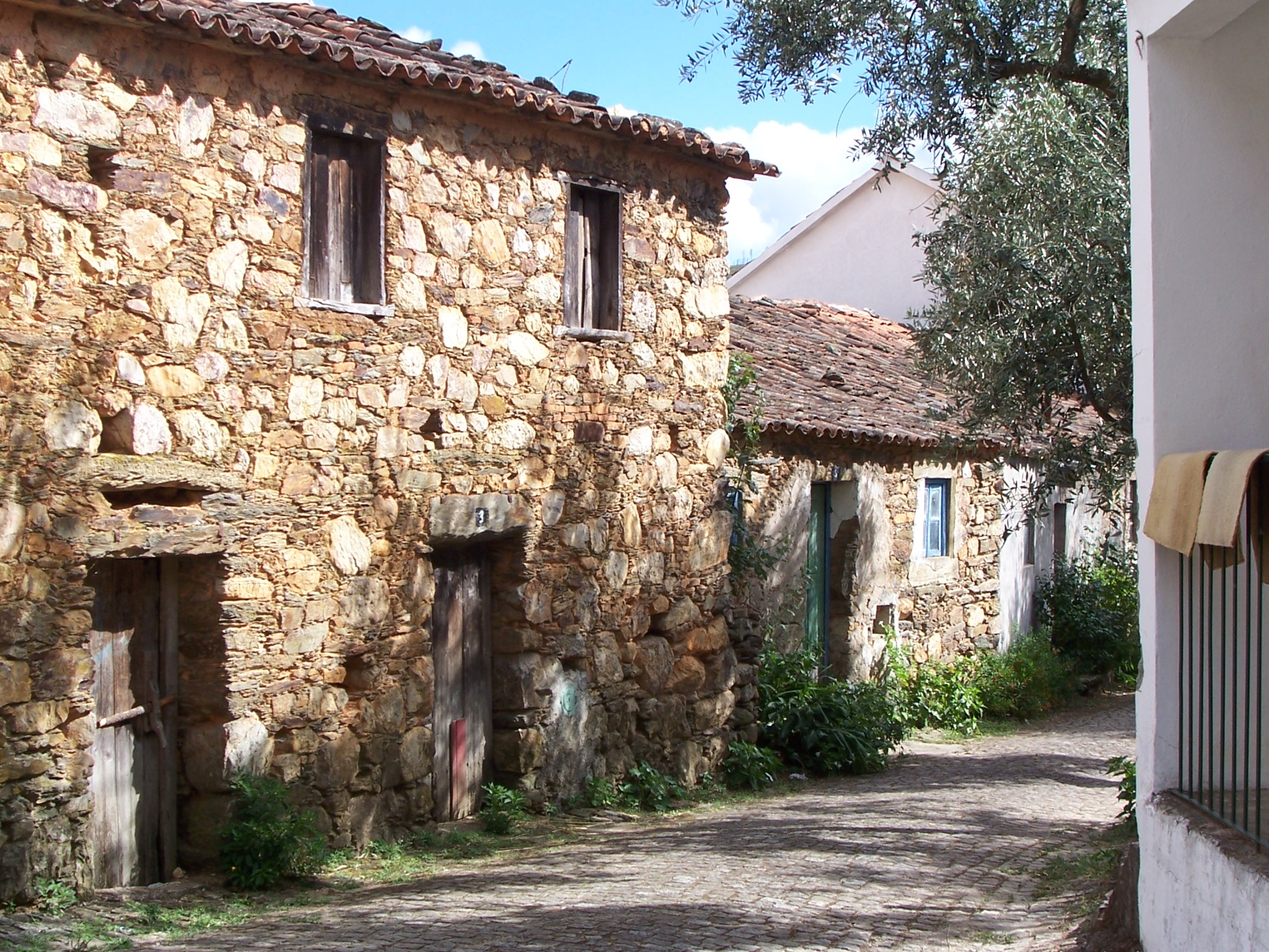 Aspecto de casas junto ao largo do antigo coreto ou alpendre, em Vilar Barroco, Oleiros, castelo Branco, Portugal.